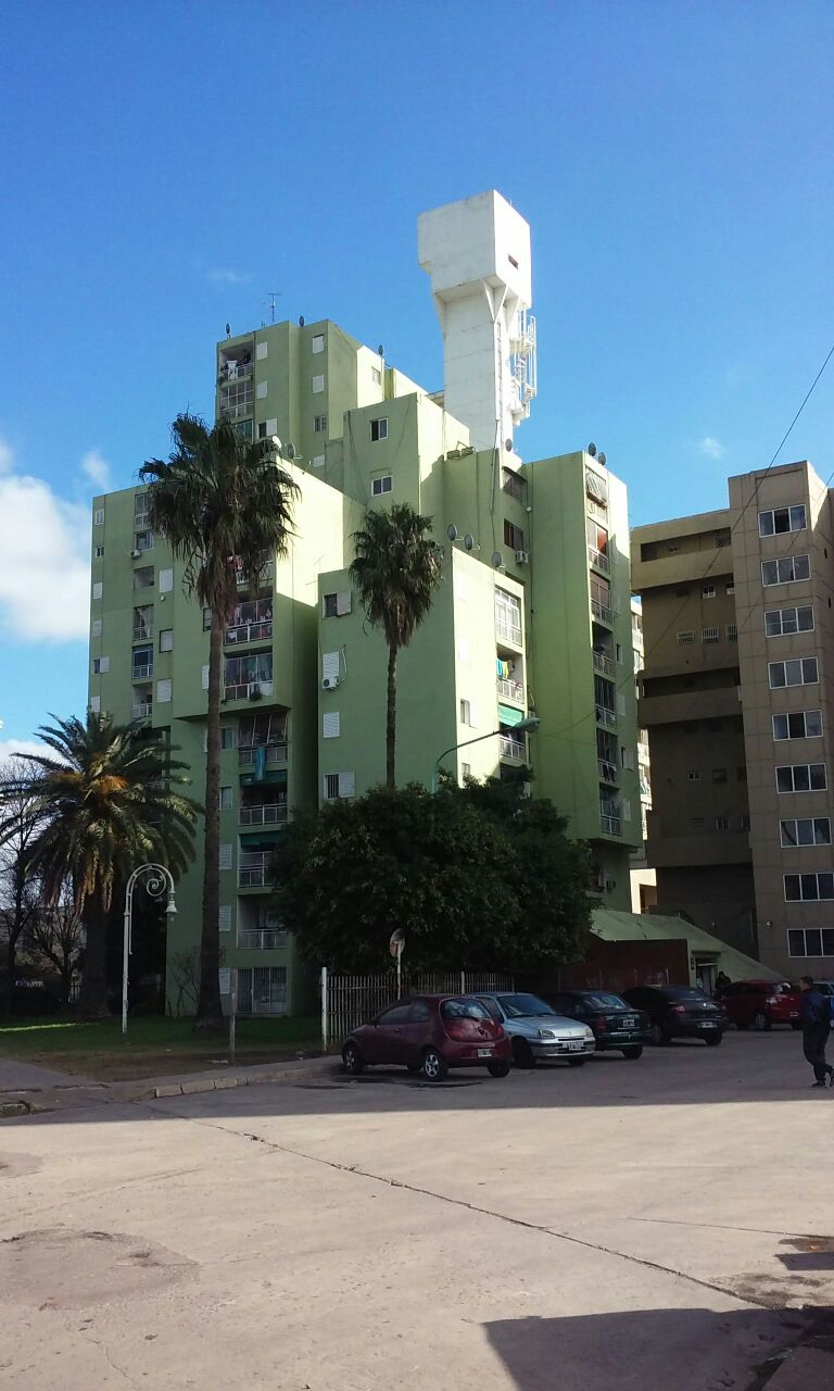 Edificio del conjunto urbano Soldati, en Av. Coronel Roca y Mariano Acosta.